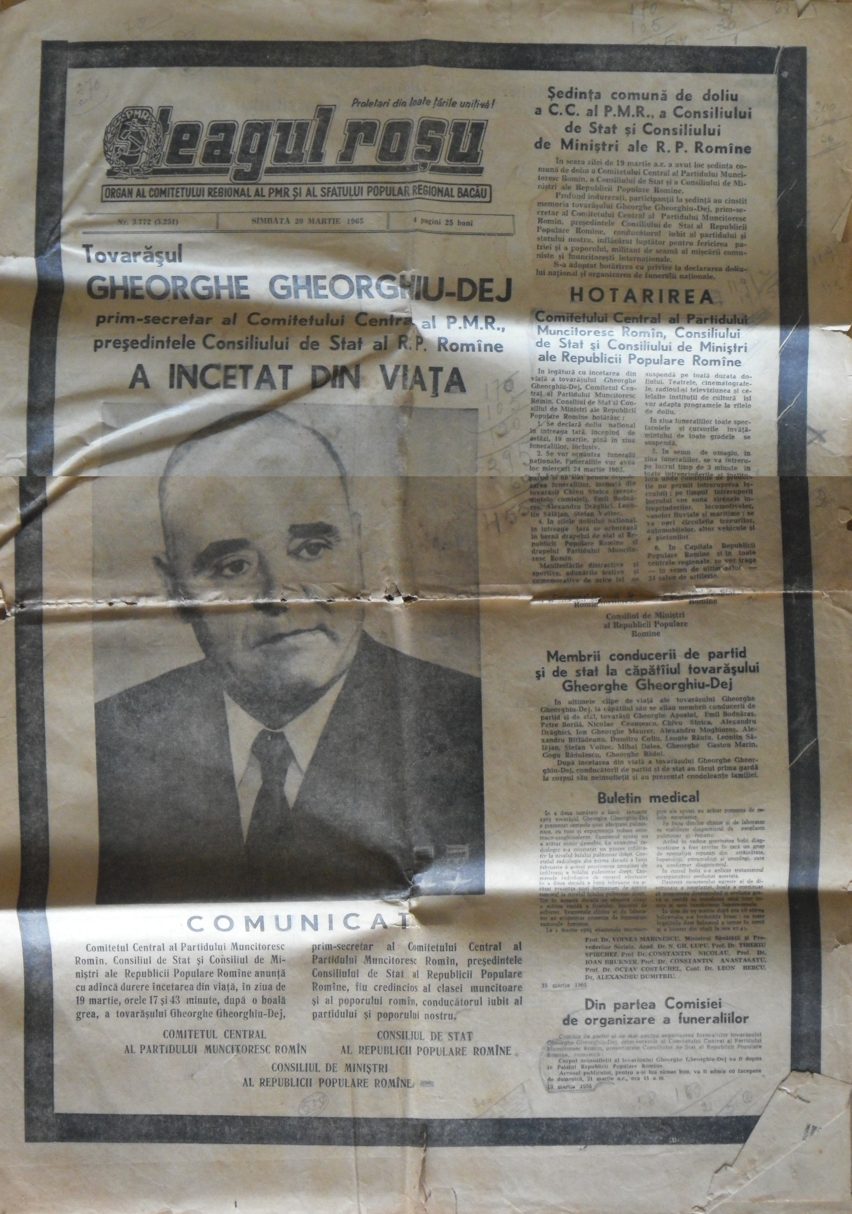 O ediție a ziarului „Steagul Roșu”-prin Organul Comitetului Central al P.M.R. și al Sfatului Popular Regional Bacău anunță moartea președintelui României